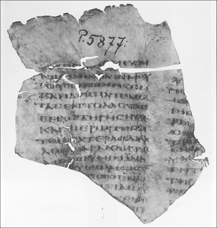 Uncial 060 (GA) manuscript of the New Testament, showing John 14:14-17, 19-21